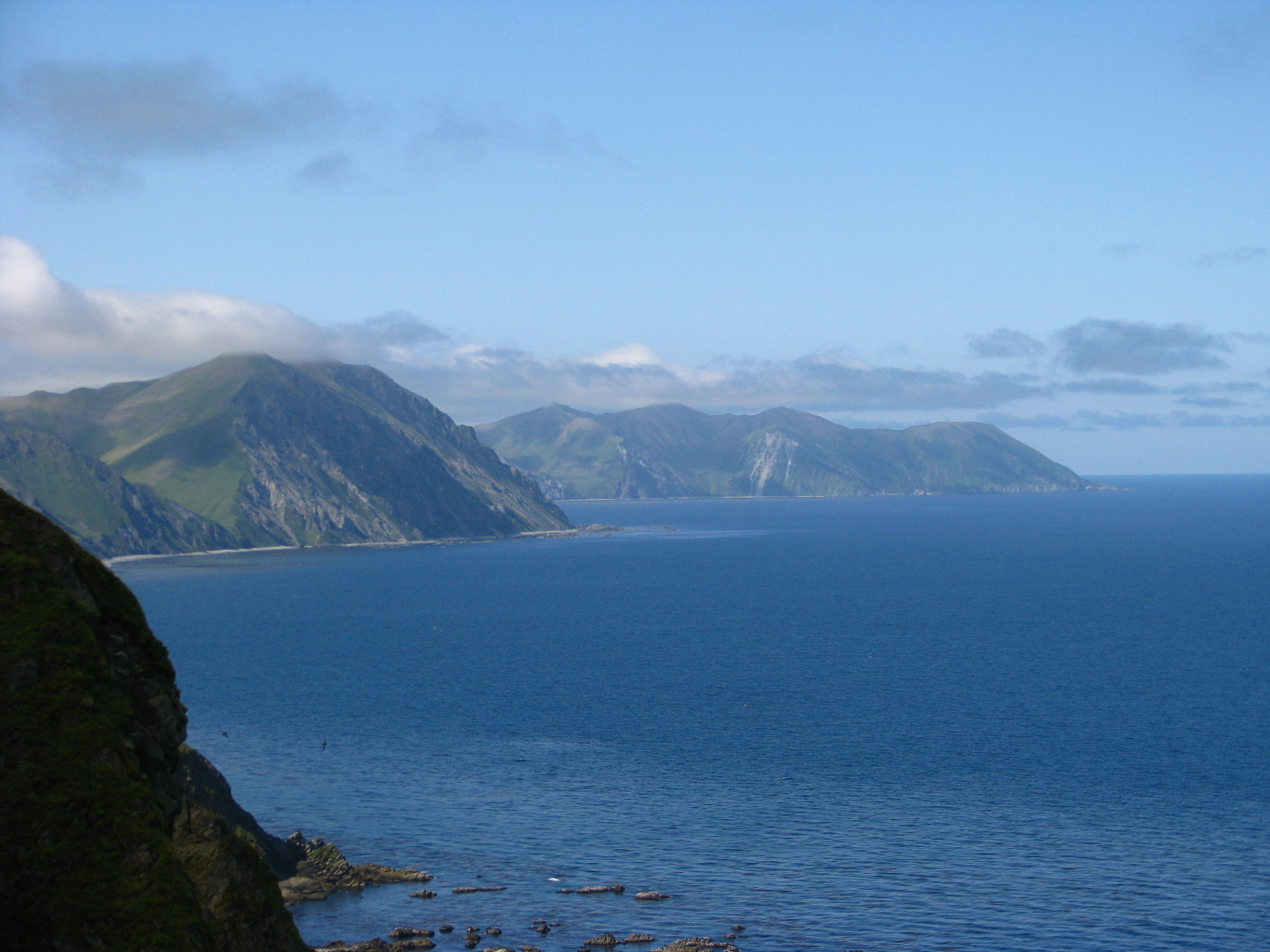 Командорский заповедник, Алеутский район This image is related to the protected area of Russia number 4100007